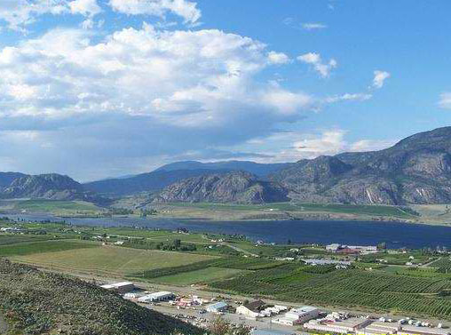 Osoyoos Lake vu de la French Hill.